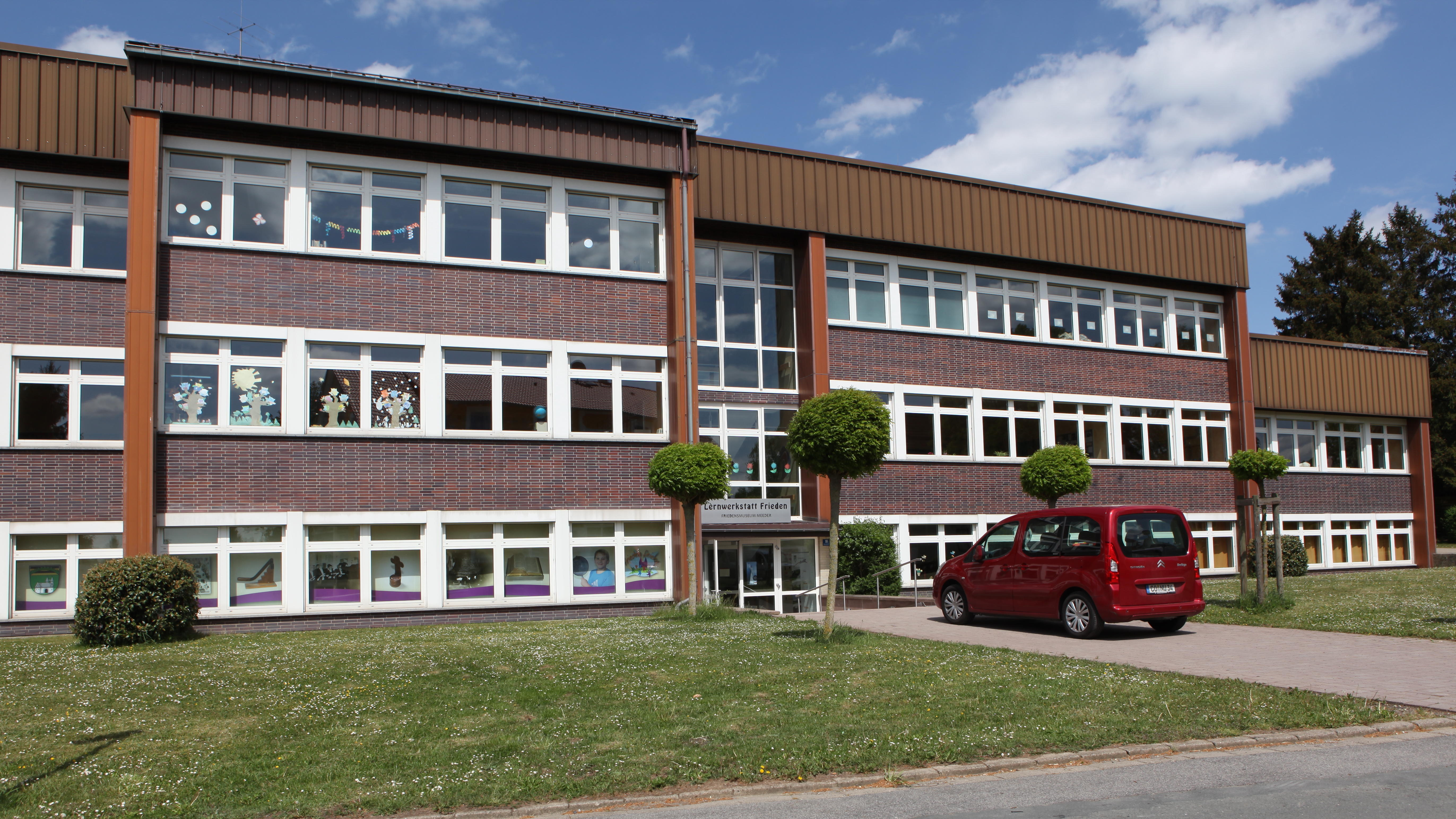 Meeder, Friedensmuseum, Schulstraße 18